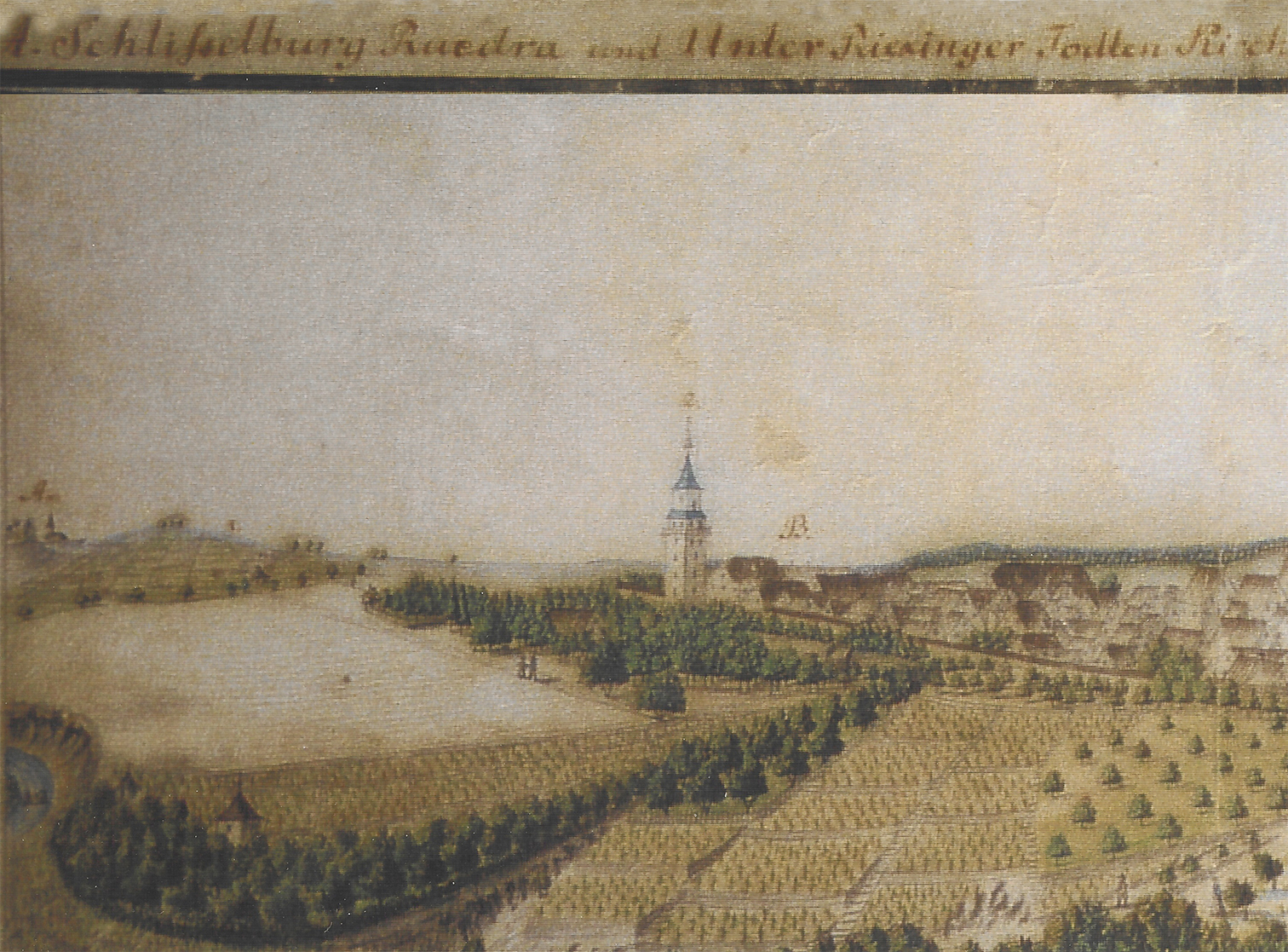 „Schlisselburg Ruedera“ (Ruine der Schlüsselburg) bei Markgröningen und „Unter Riexinger Todten Kirch“ (siehe Legende) am linken Bildrand dieses Ausschnitts eines Stadtpanoramas vermutl. von K. U. Keller (1797) zur Legende: Ruedra = schwäbische Schreibweise für Rudera (Ruine)